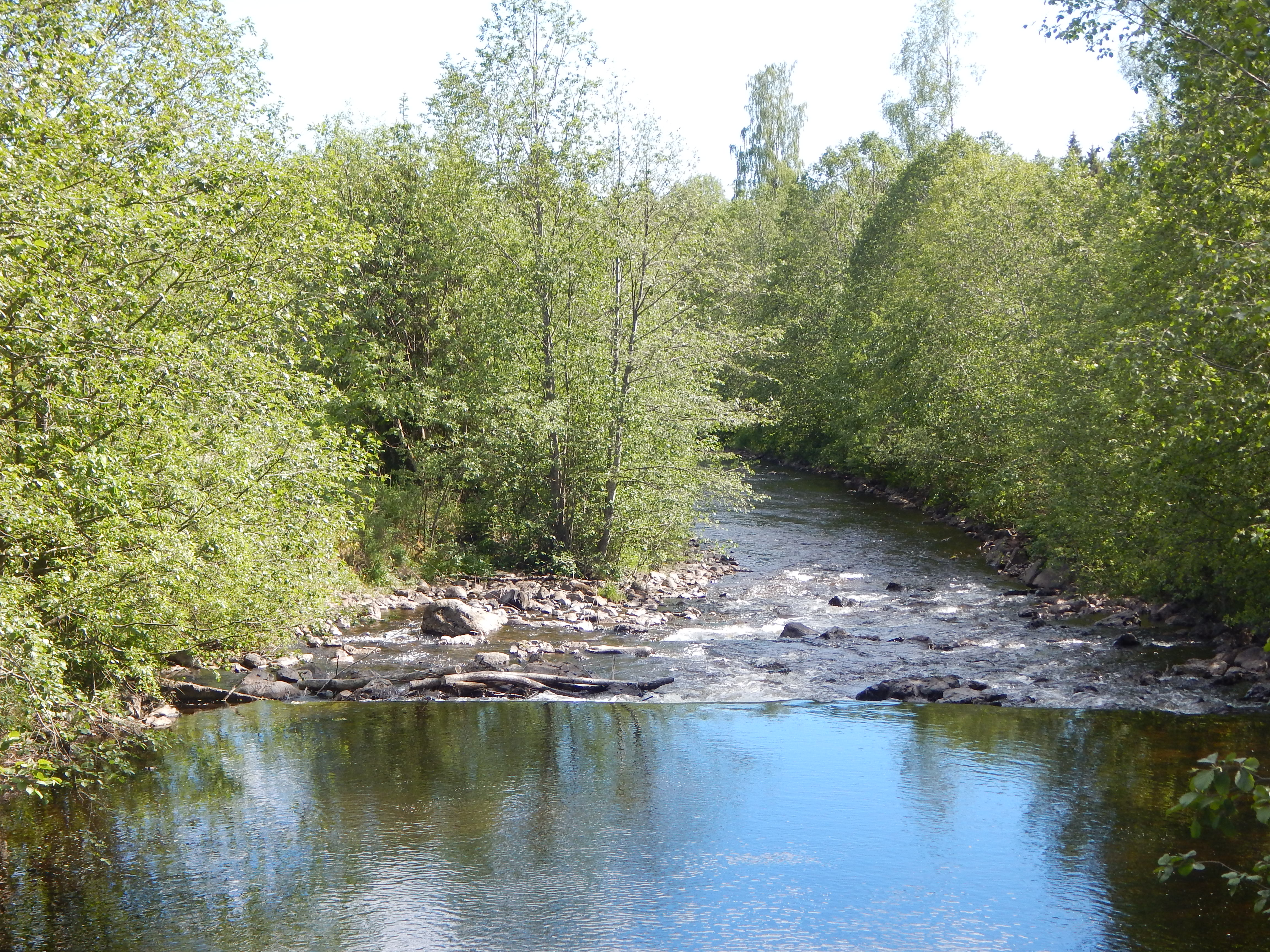 Langlielva